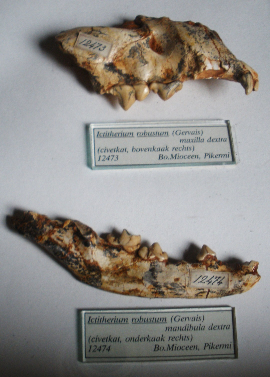 Fossil of Ictitherium, an extinct hyaenid - Took the photo at Teylers Museum, Haarlem